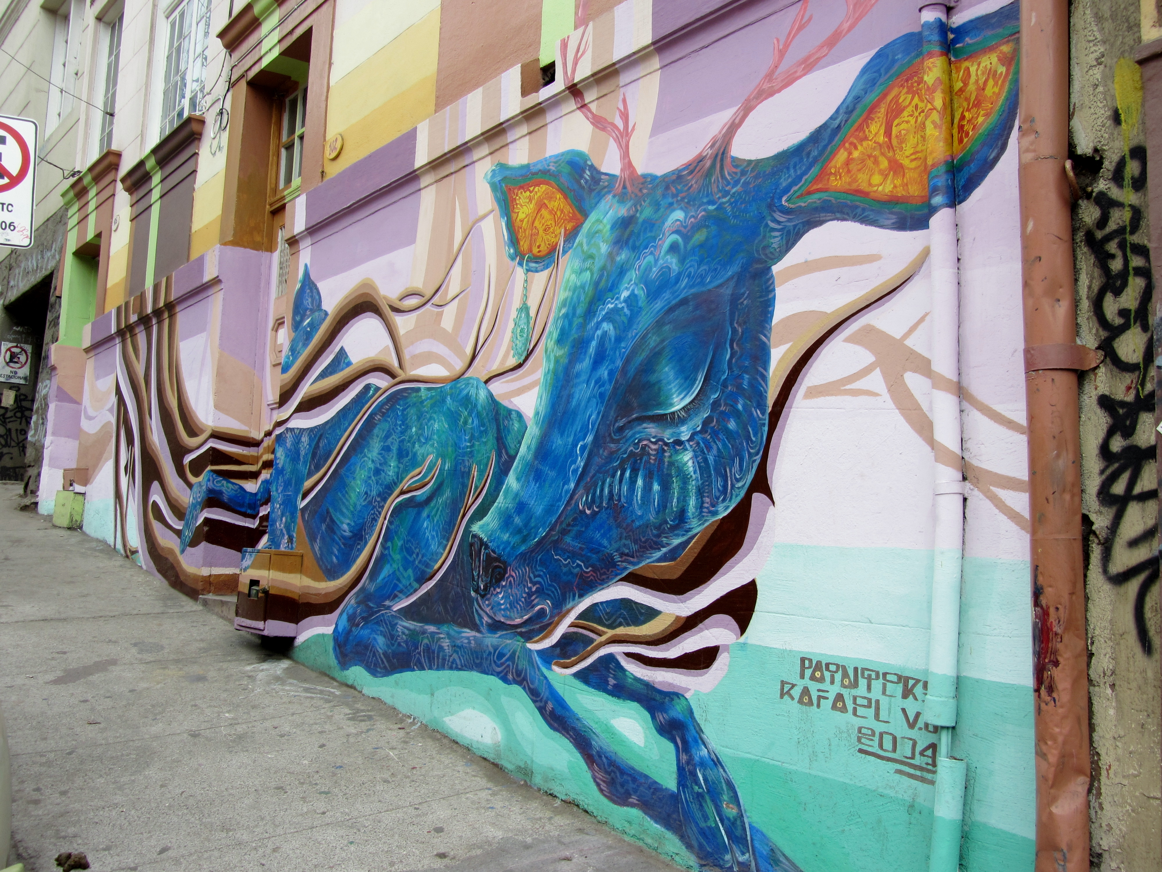 La invitación, grafiti del chileno Painters (Gonzalo Sánchez) y del mexicano (Guadalajara) Rafael VeO (también Rafael V.O., Rafael Vázquez Orozco) pintado en diciembre de 2014 en el cerro Alegre de Valparaíso